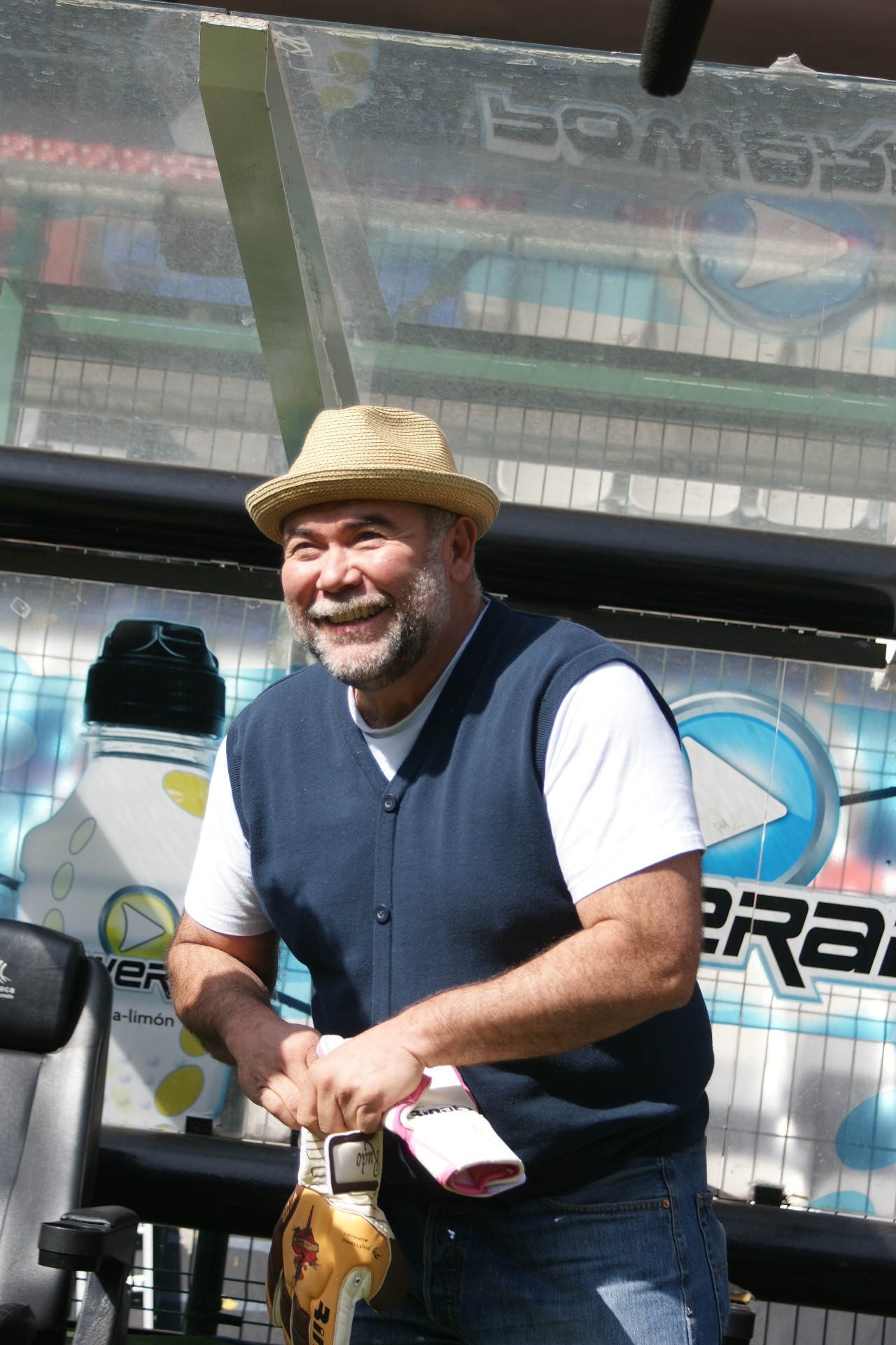 Jesús Ochoa se pone los guantes de Rudo y Cursi.